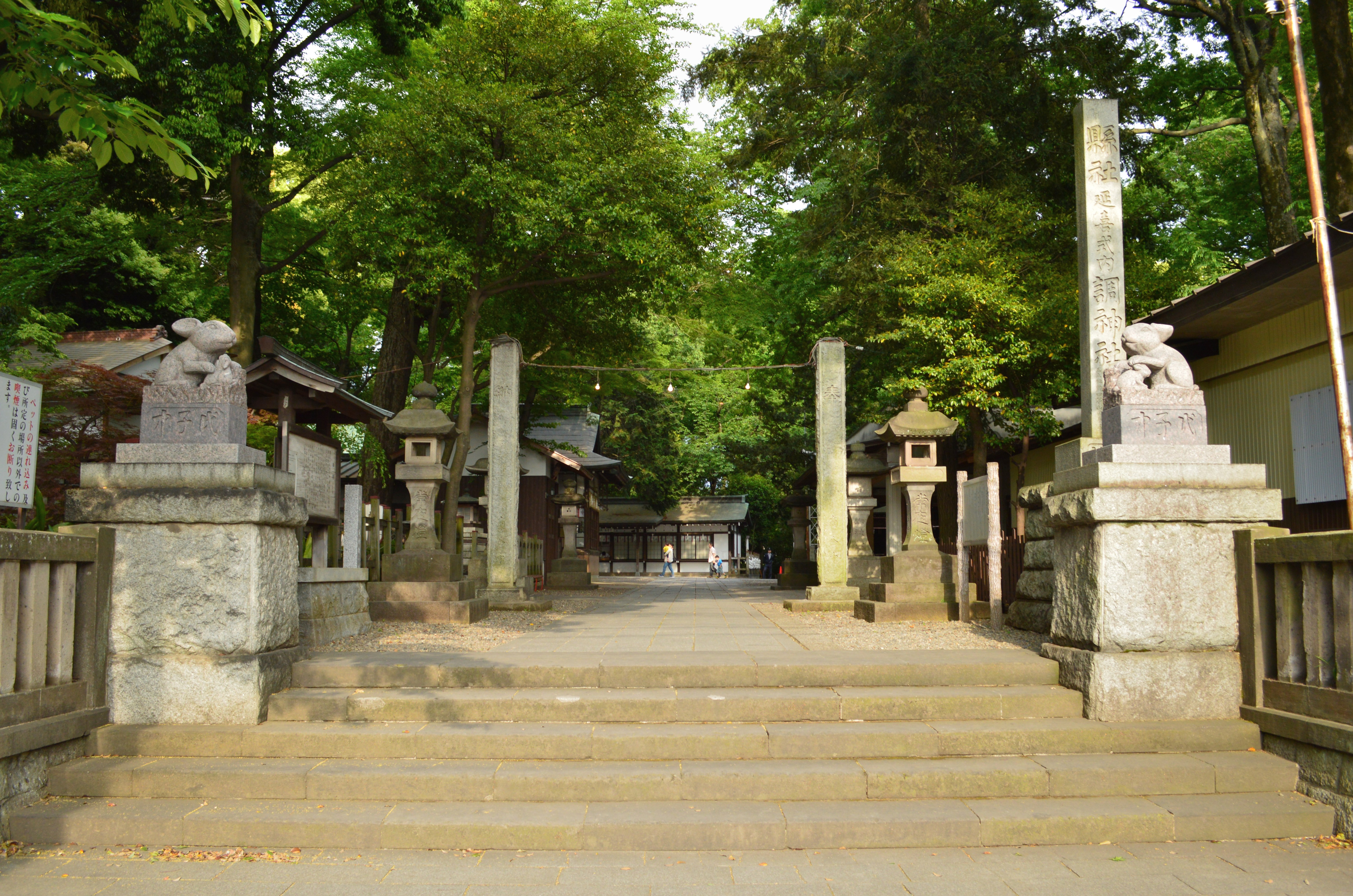 調神社 境内入り口